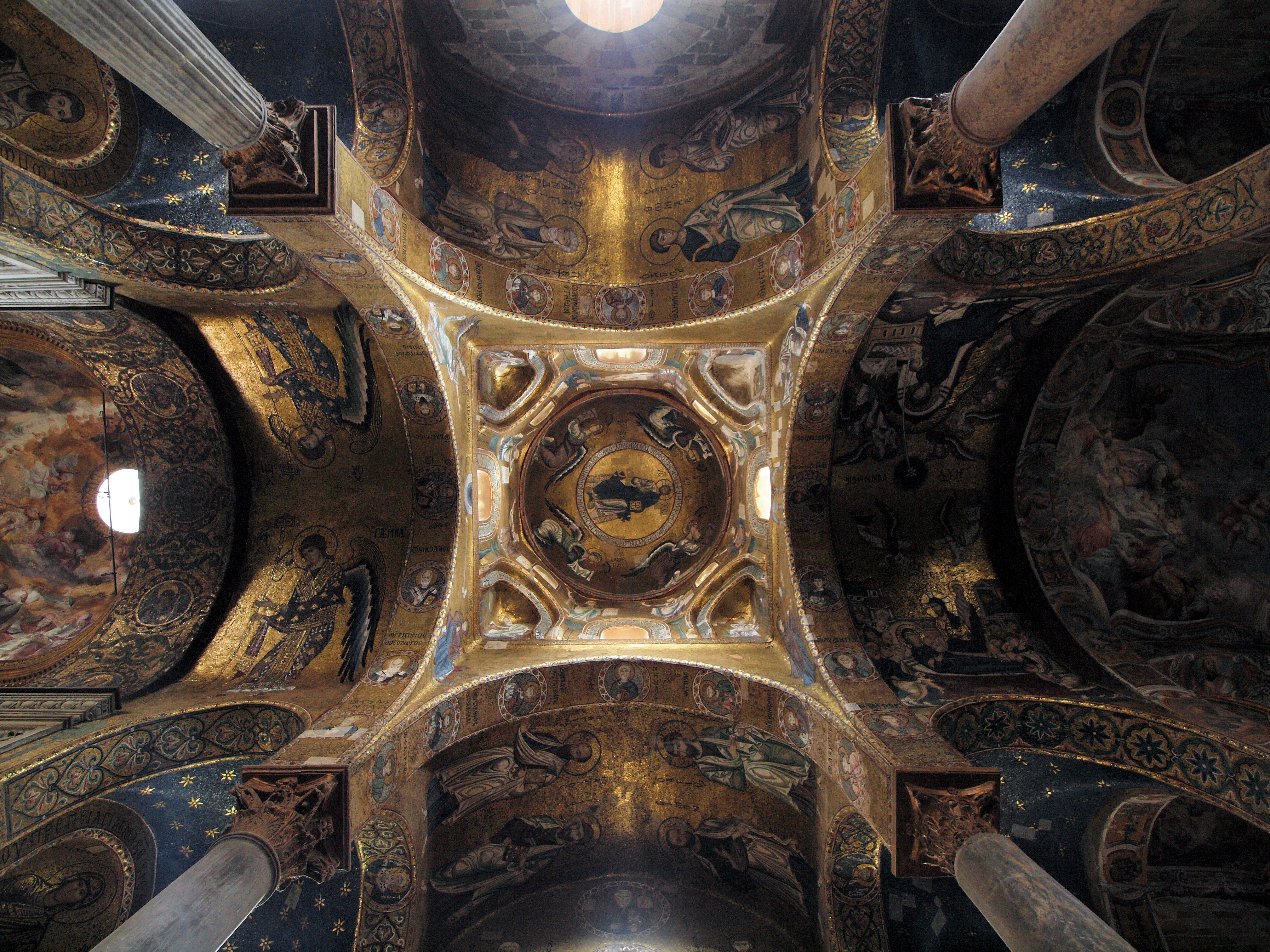 Innenaufnahme aus der Kirche Santa Maria dell'Ammiraglio in Palermo, auch genannt Martorana